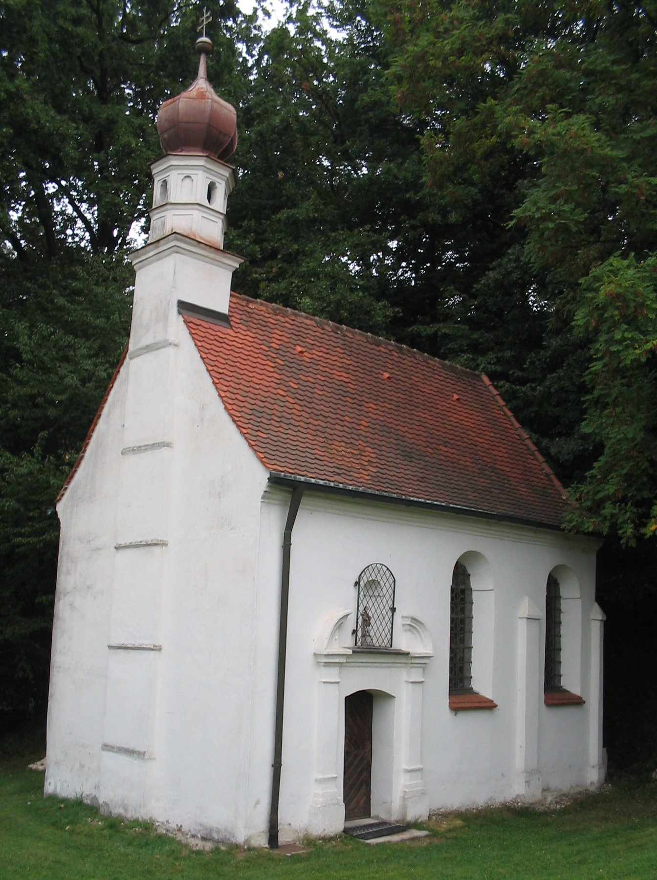 Barocke Wallfahrtskapelle in Sankt Kastl